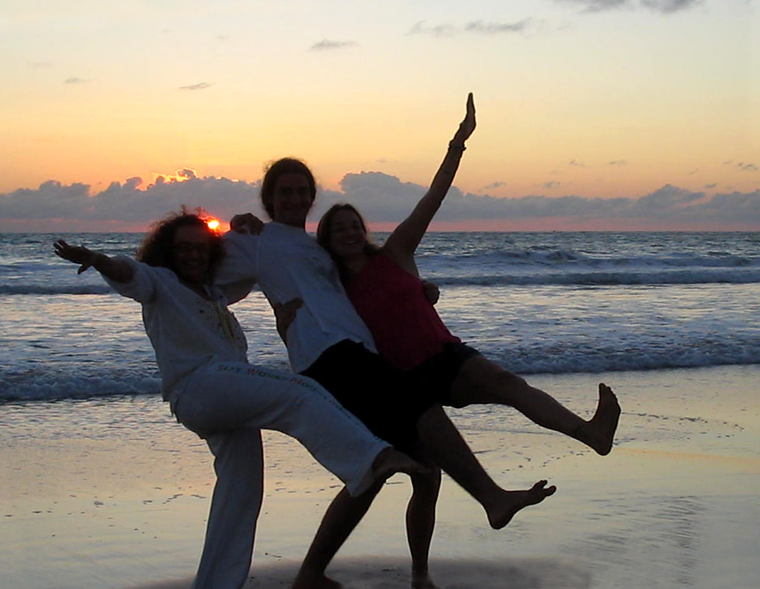 A manha é fazer valer a pena. Fica ai a dica.